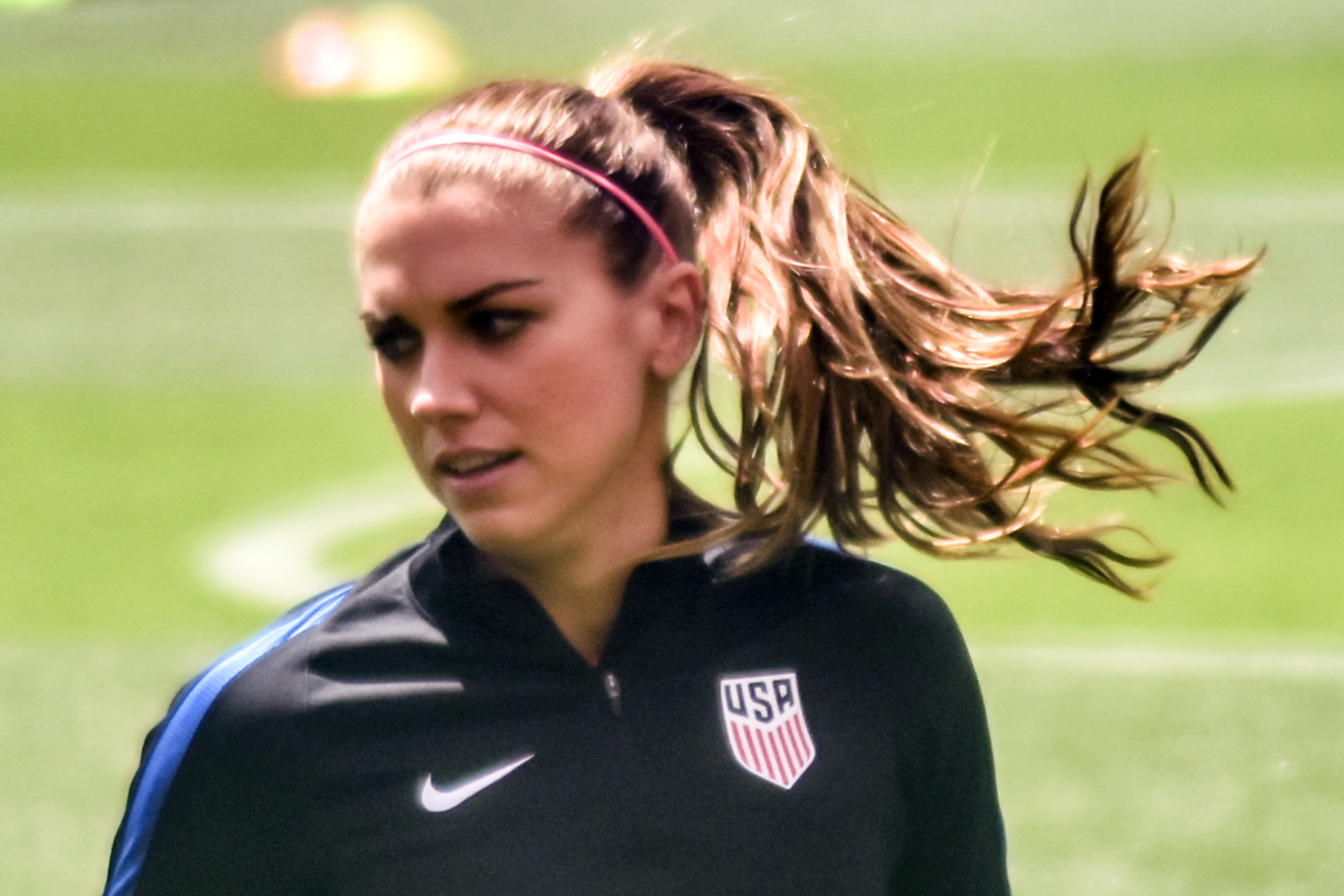 From Flickr user edrost88, match details here